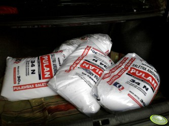 produkty dla rolnictwa